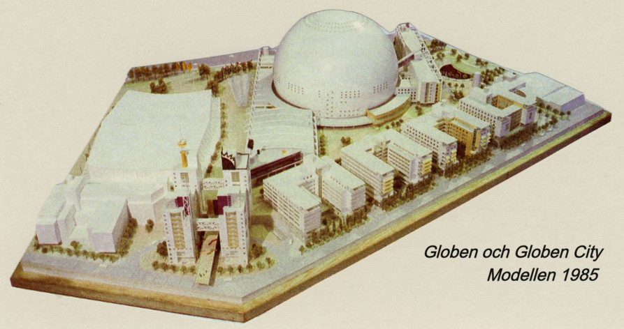 Globen och Globen City, modellen